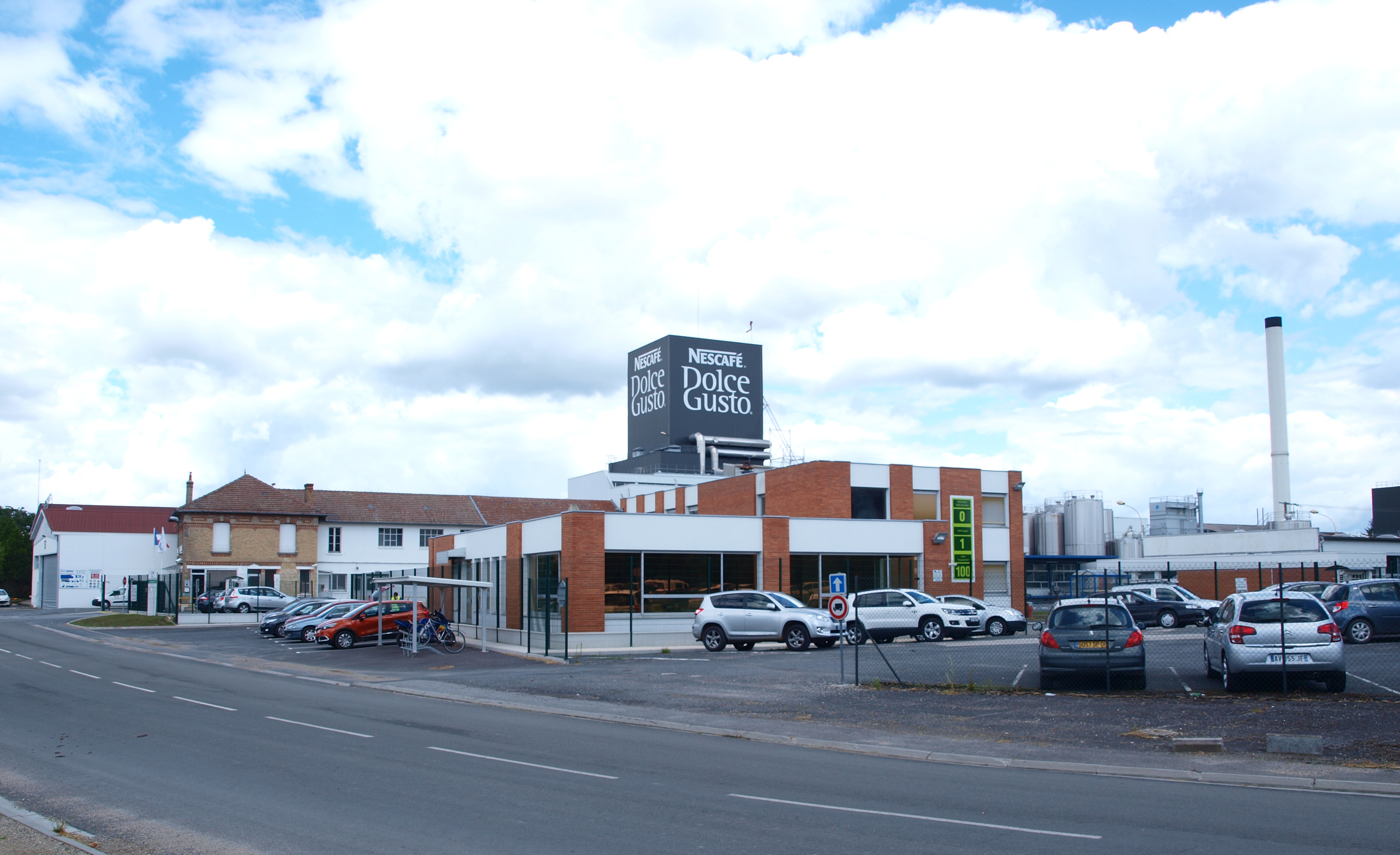 Challerange (Ardennes, France) : usine NESTLÉ.